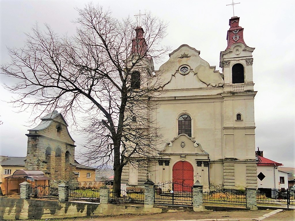 г. Турка Львовской области Украины